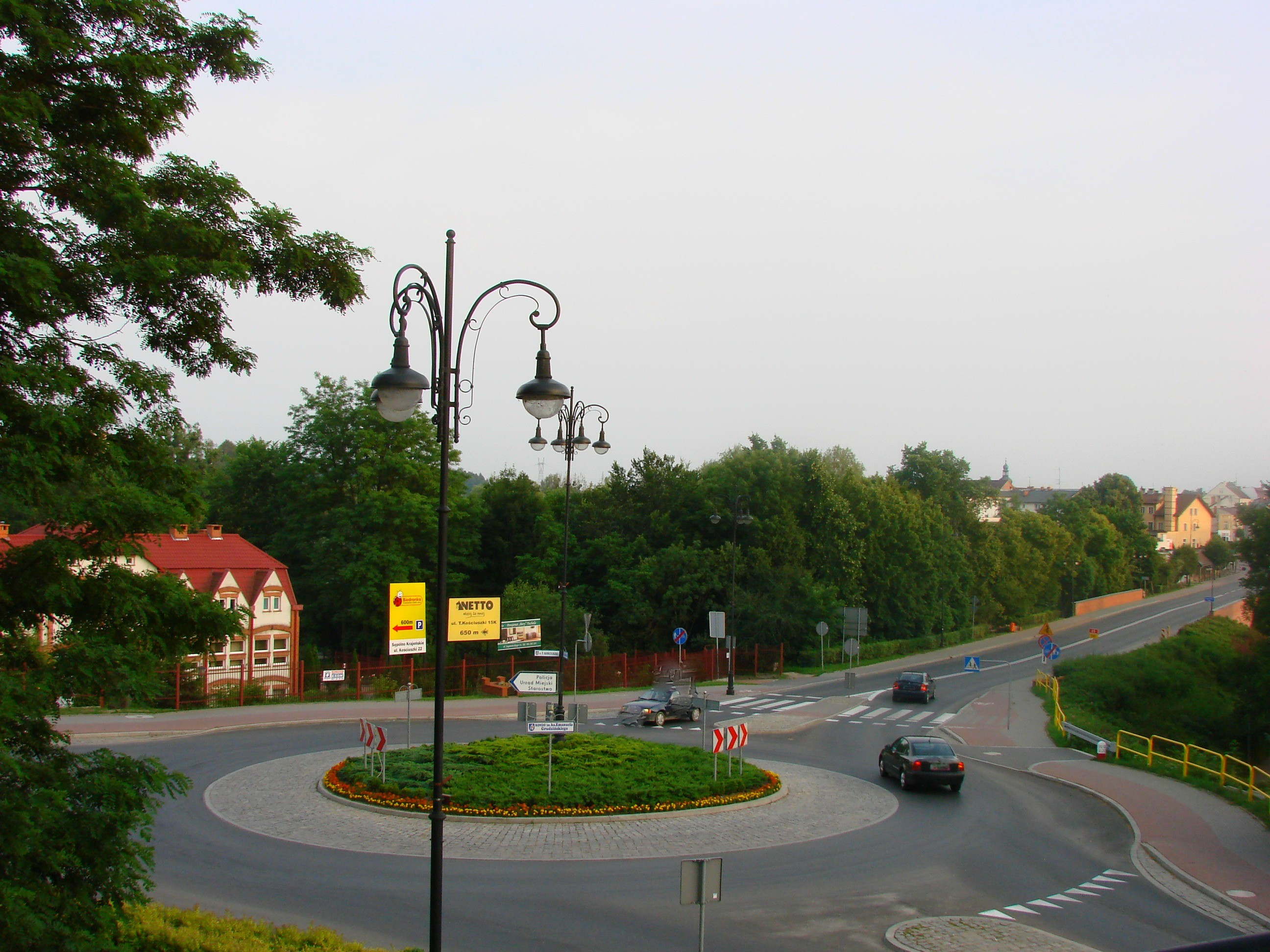 Rondo im. ks. Emanuela Grudzińskiego u zbiegu ulic T. Kościuszki i Chojnickiej. Place in Sępólno Krajeńskie, Poland.